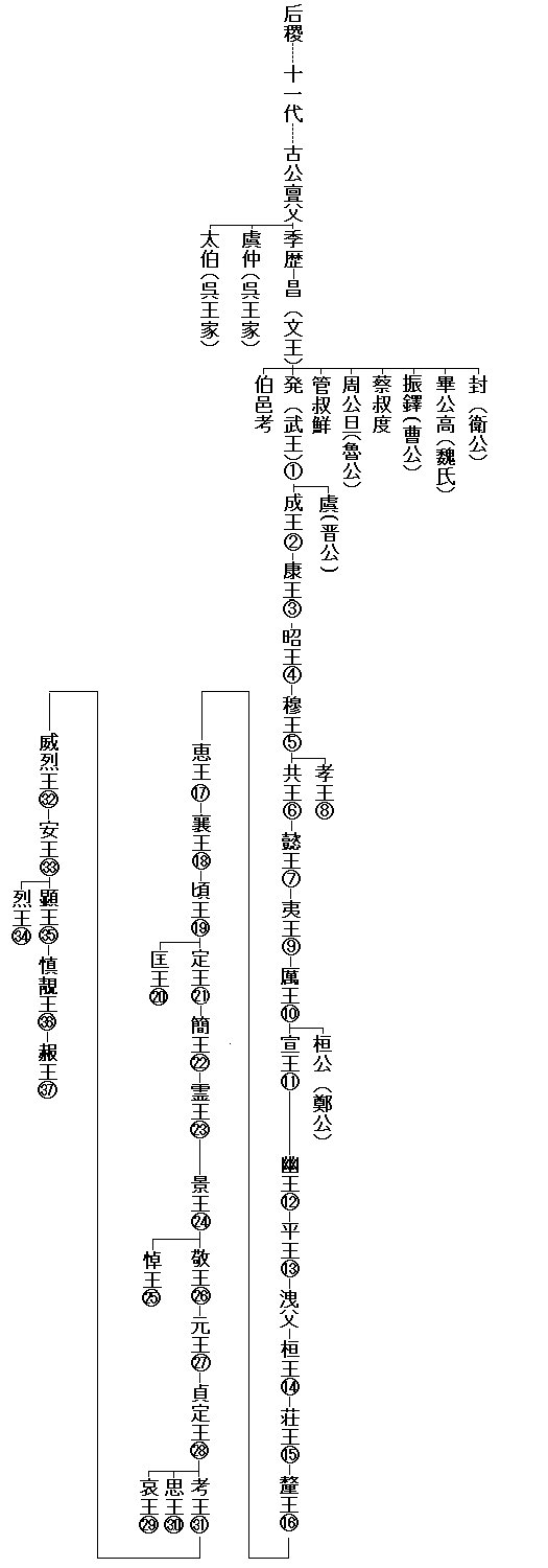 周王朝家系図。投稿者による自作。左が年長。重要でない人物は省略してある。